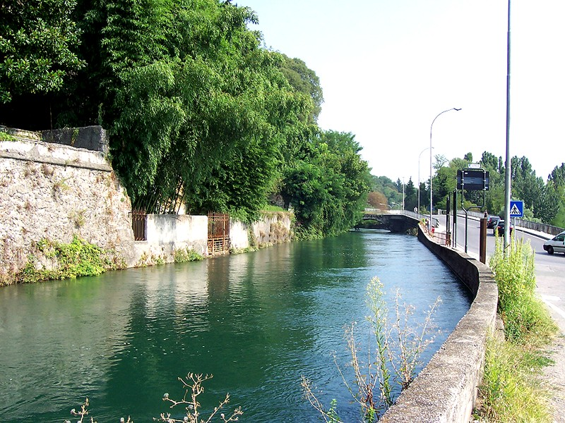 Vaprio d'Adda - Naviglio Martesana